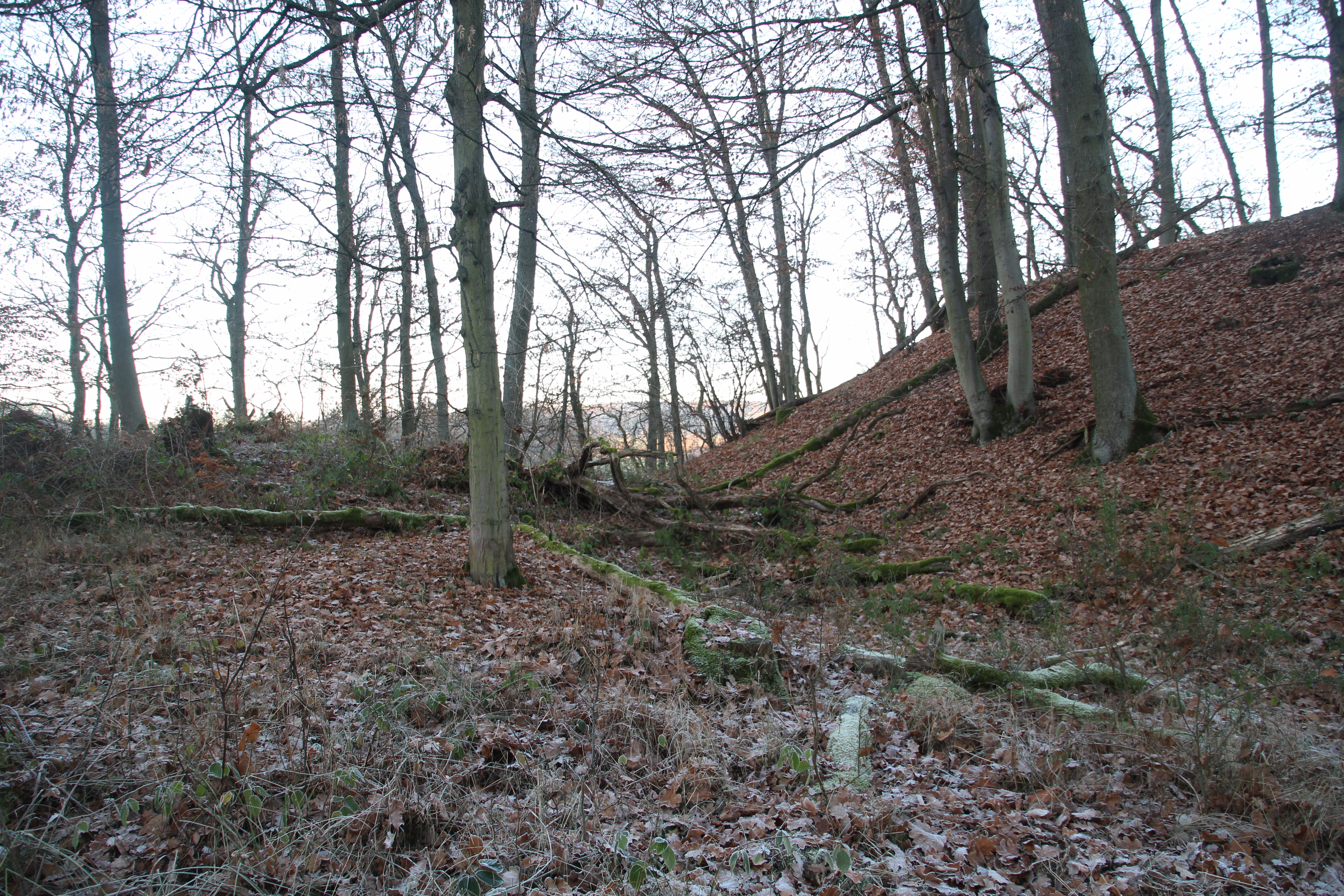 Siehe Bild und Dateiname